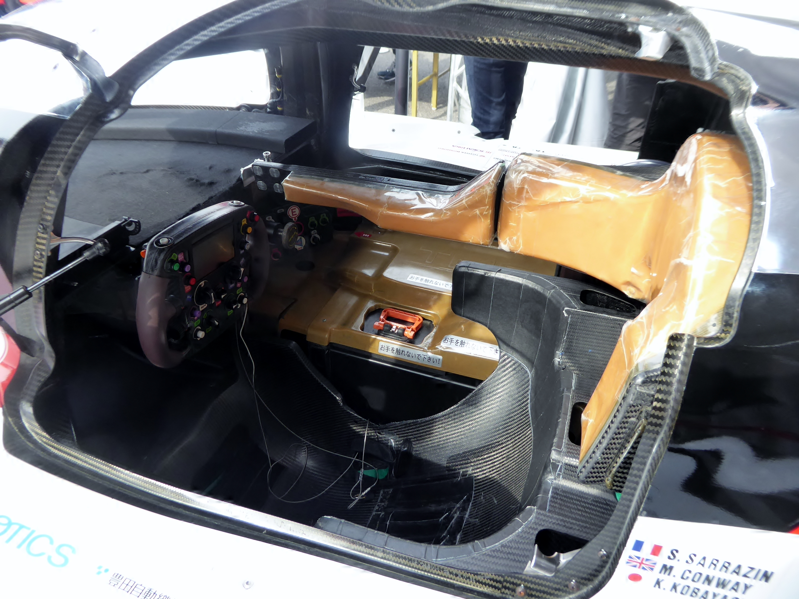 6号車TOYOTA TS050 HYBRIDの2017年仕様のインテリアを撮影。